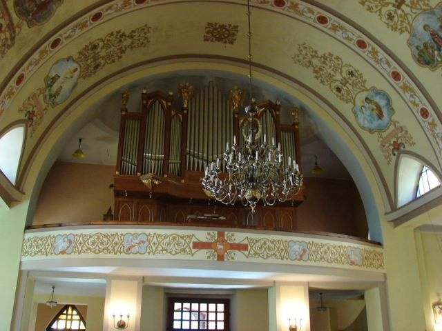 Chór i organy kościelne